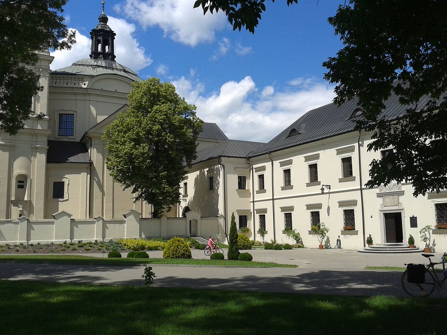 Klasztor